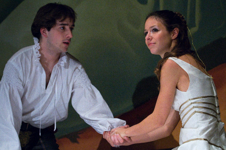 Snímek z inscenace "Romeo a Julie" autora Williama Shakespeara. Na snímku Matouš Ruml a Veronika Kubařová.